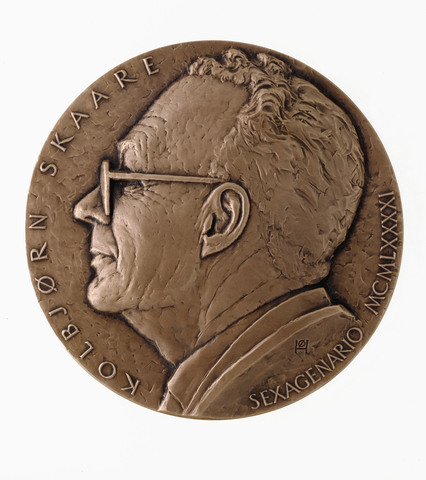 Kolbjørn Skaare medalje. Utgitt ved Kolbjørn Skaare´s 60års dag 6. april 1991. Medaljør: Øivind Hansen